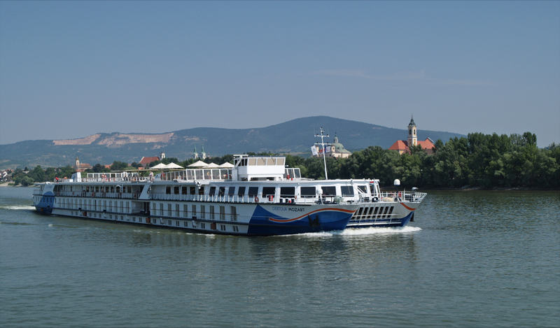 Kabinenfahrgastschiff DERTOUR Mozart auf der Donau